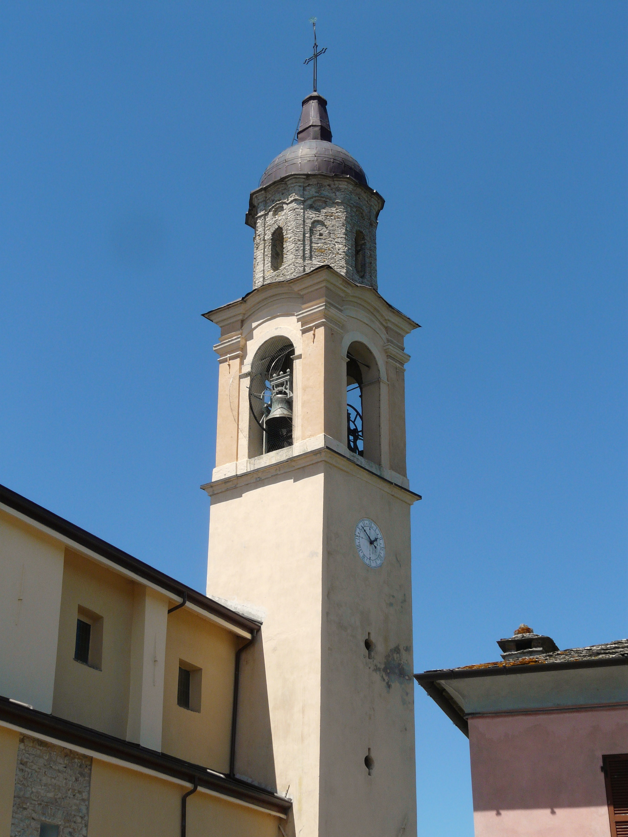 Chiesa di San Bernardino da Siena, Tornolo, Emilia Romagna, Italia